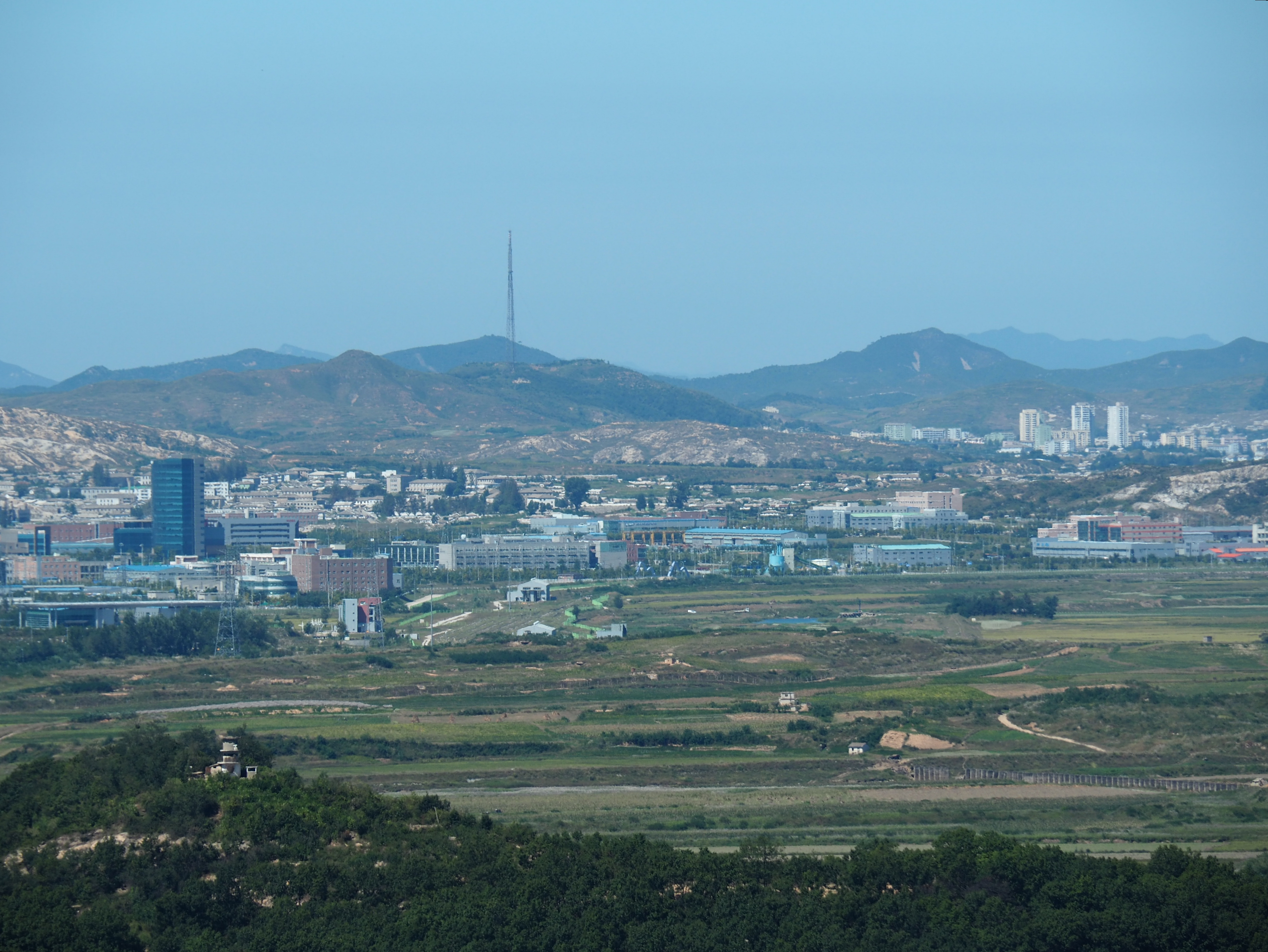 Dora Observatory